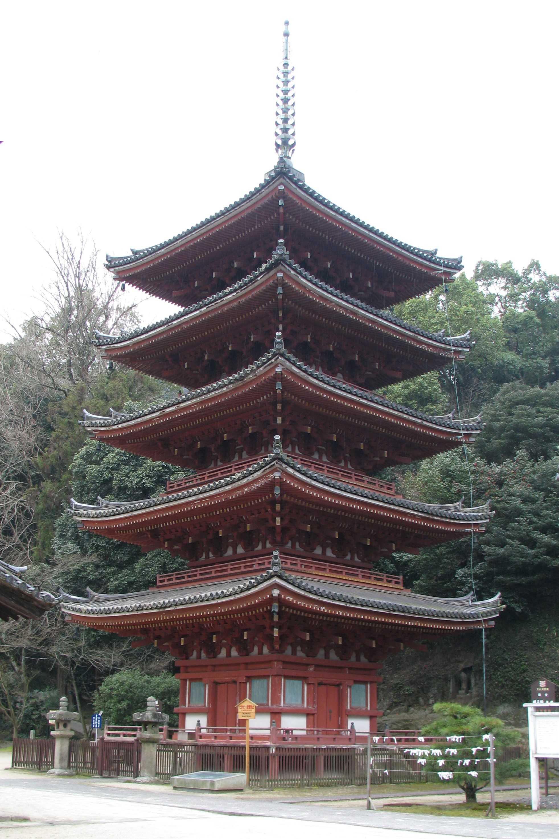 Myôô-in Five stories Pagoda